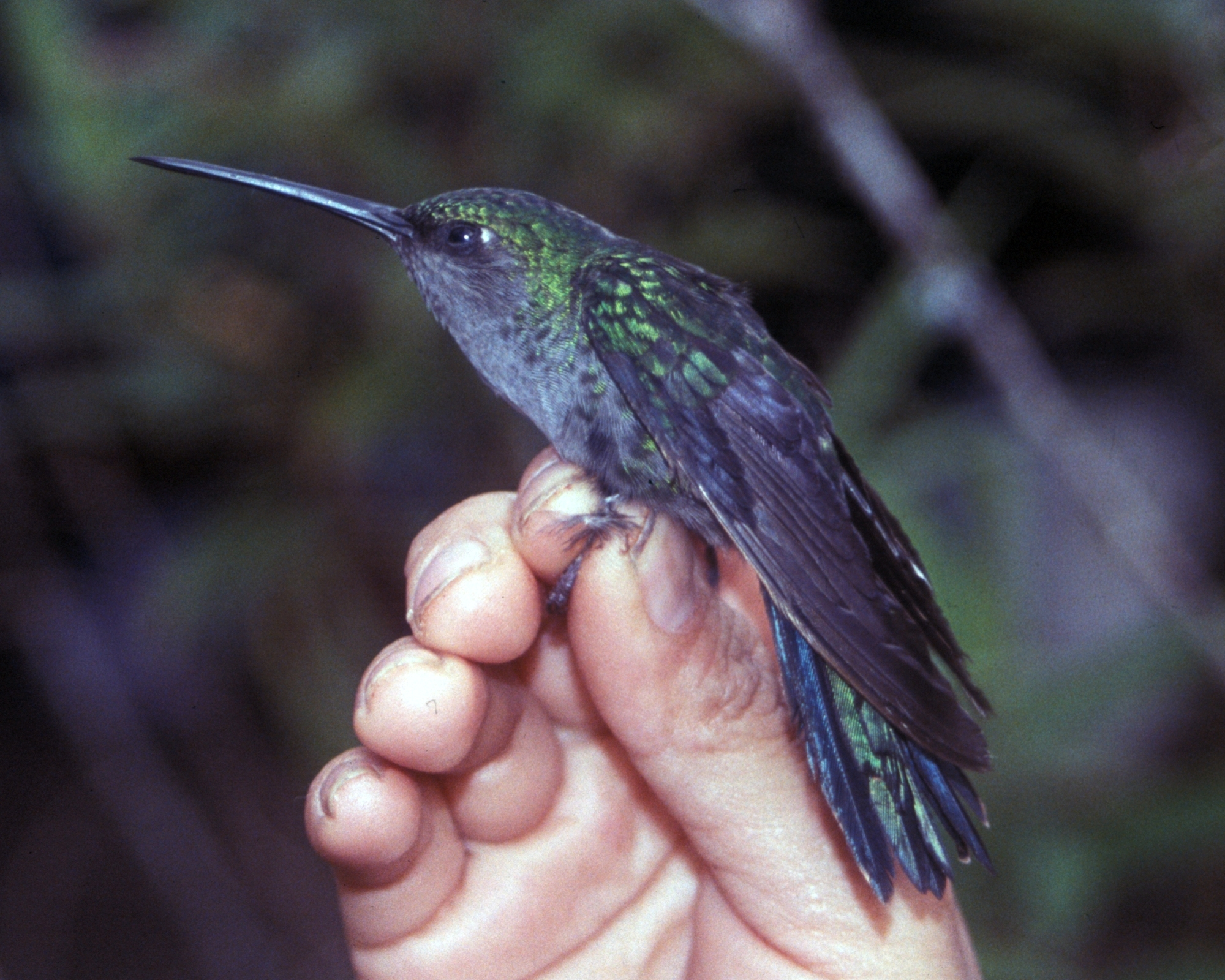 Napo Sabrewing (Campylopterus villaviscensio). Female from Cordillera del Cóndor, Ecuador.